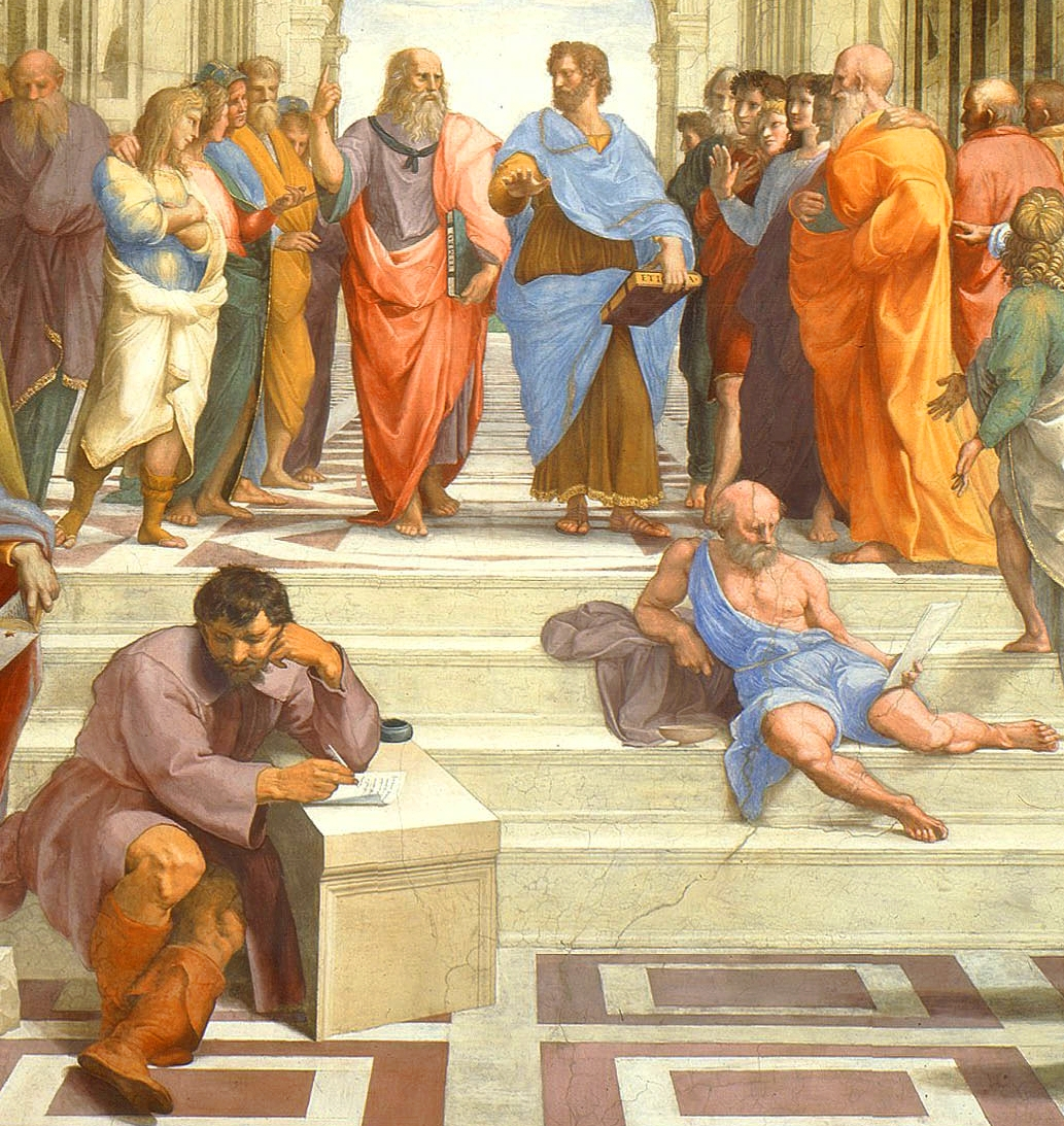 Détail de la fresque « L'École d'Athènes » peinte par Raphaël en 1509